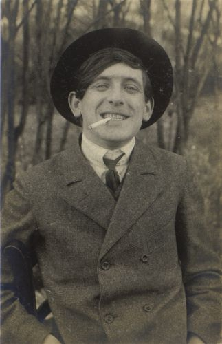 Fran Podrekar